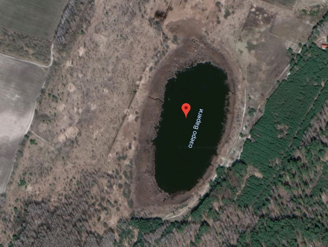 Озеро Варги (Варяги) село Савин